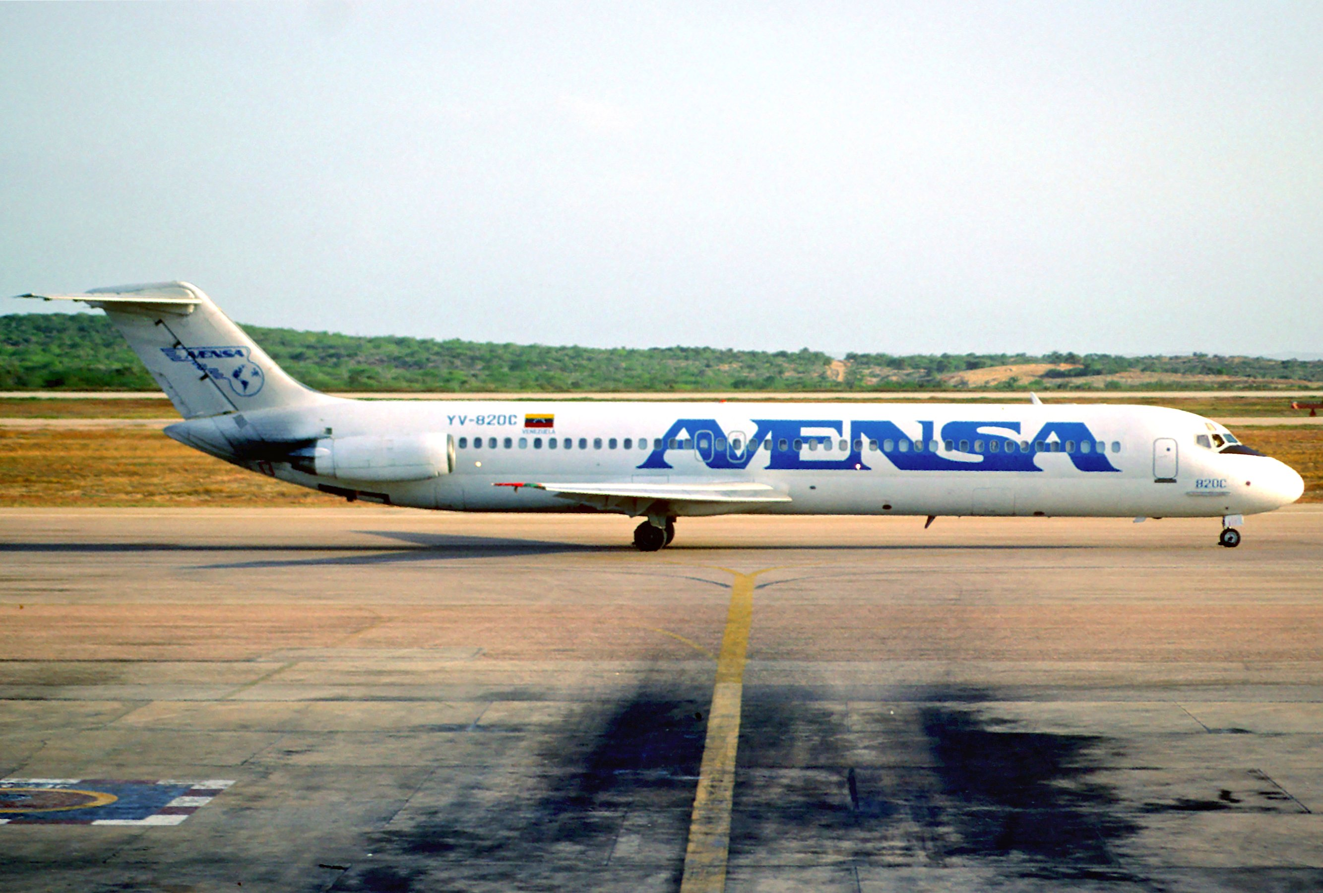 152aw - AVENSA DC-9-51; YV-820C@PMV;10.10.2001